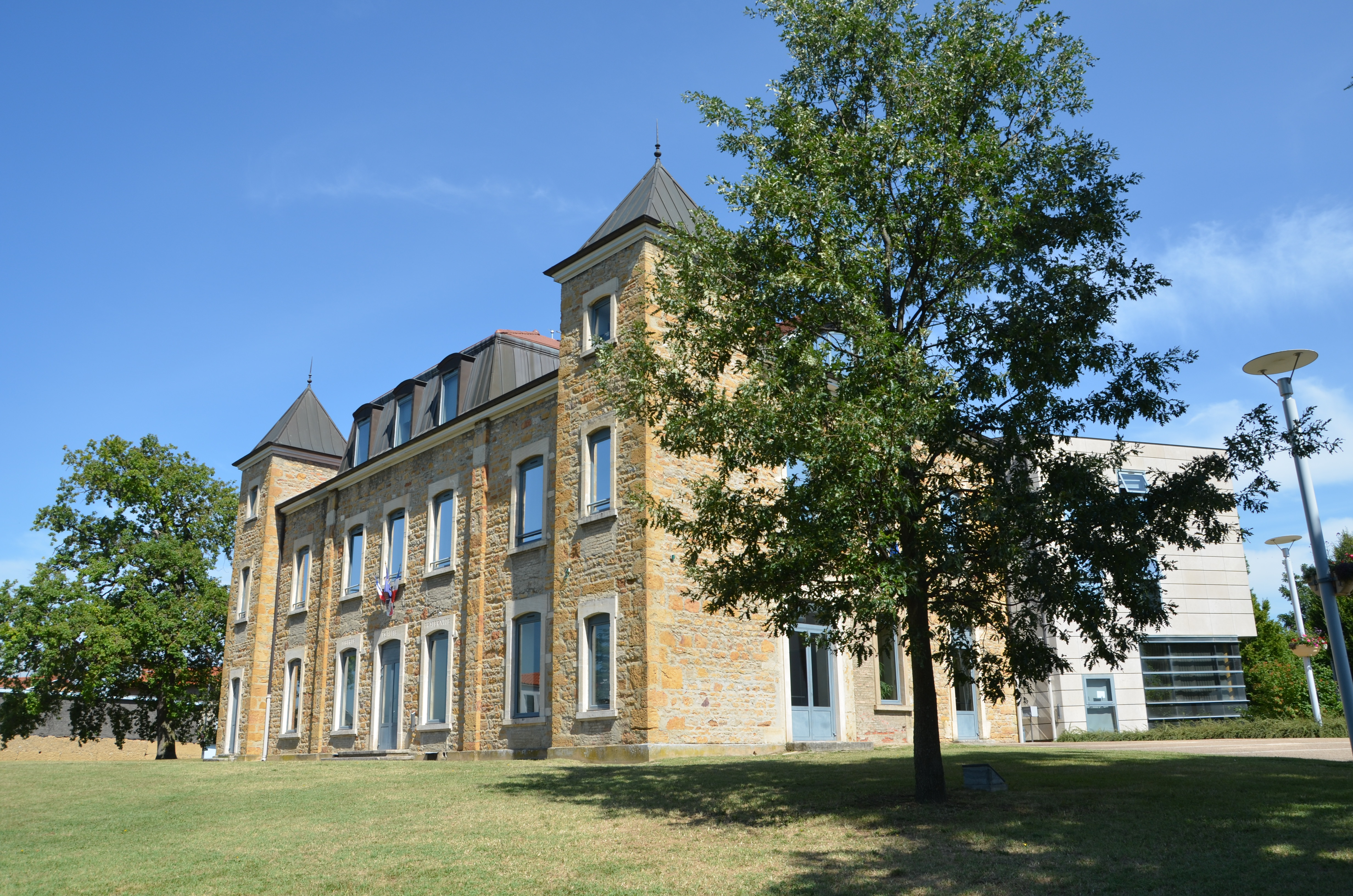 Hôtel de ville Rillieux-la-Pape